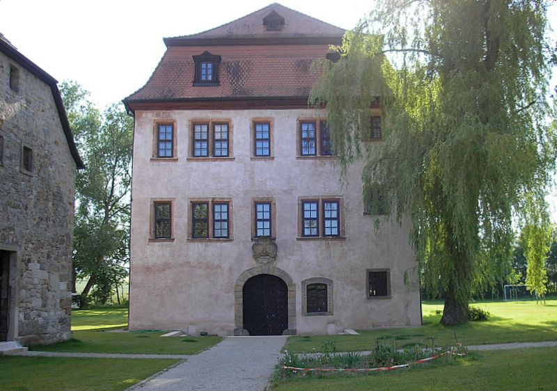 Schloss Leuzendorf (Landkreis Haßberge, Unterfranken)/ Leuzendorf Castle, Lower Franconia, Germany. Ostseite / Eastern view. Eigene Aufnahme, Juni 2006 / Own photo, June 2006